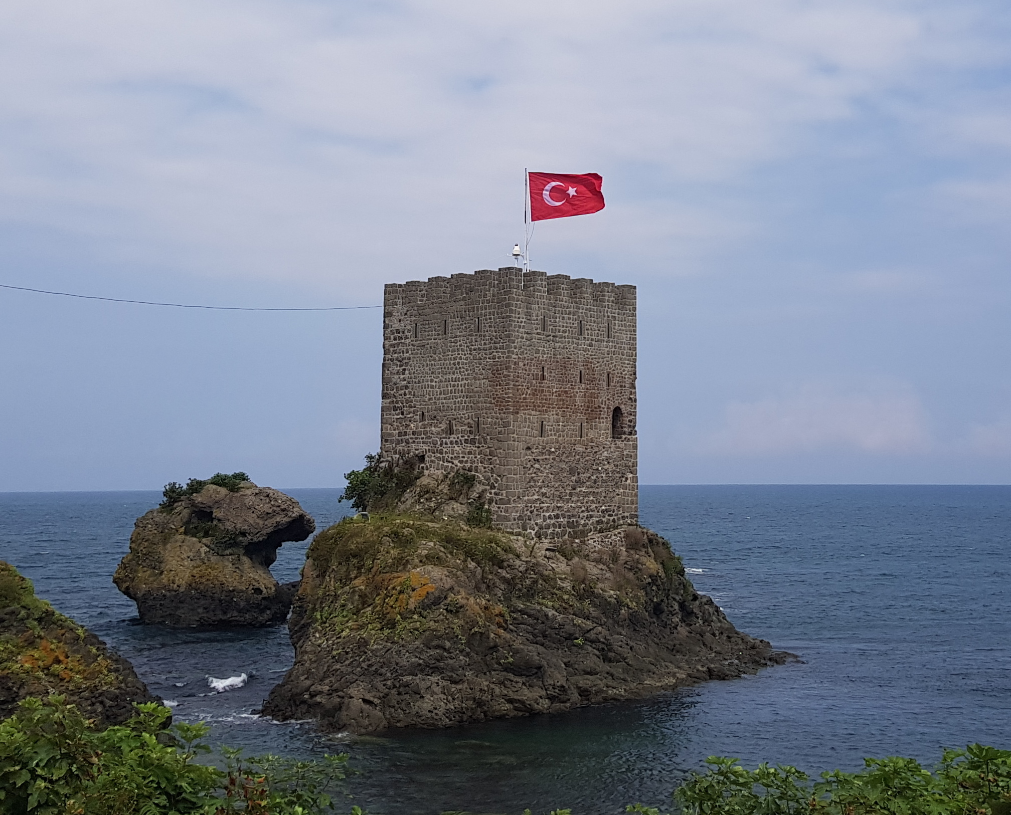 kiz kalesi - black sea